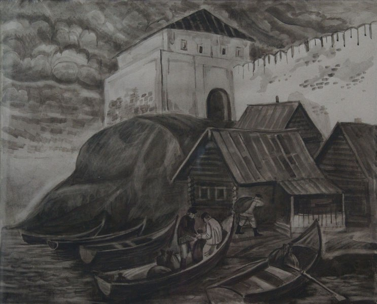 Кудряшова Станислава серия работ «Старая Казань» «На казанском побережье» бумага,соус 2011г